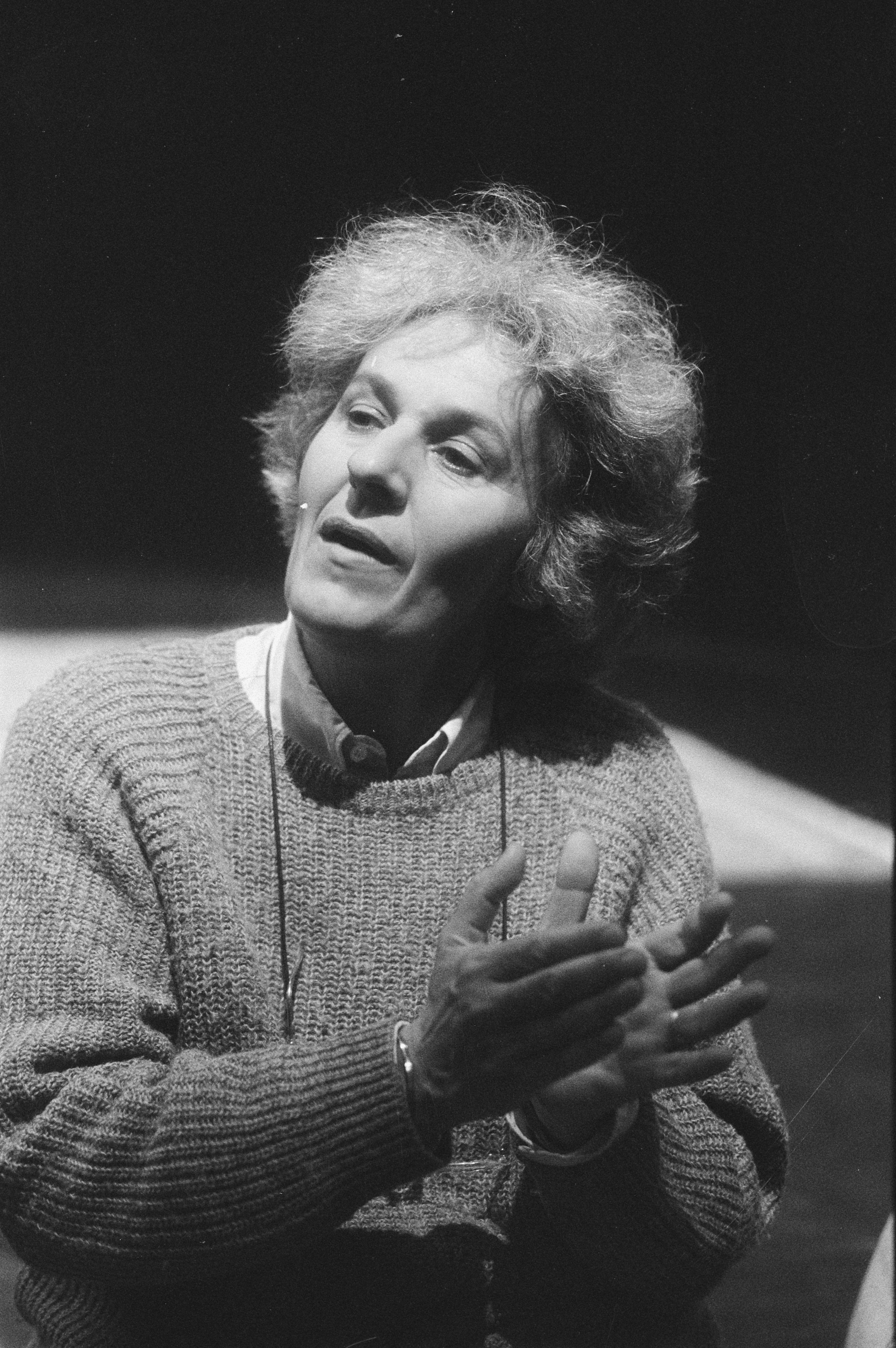 Collectie / Archief : Fotocollectie Anefo Reportage / Serie : [ onbekend ] Beschrijving : Persconferentie Ariane Mnouchkine , regisseur van Theatr du Soleil, in Tropenmuseum Amsterdam, Datum : 6 juni 1986 Locatie : Amsterdam, Noord-Holland Trefwoorden : Regisseurs, persconferenties Persoonsnaam : Ariane Mnouchkine Instellingsnaam : Tropenmuseum Fotograaf : Gerrits, Roland / Anefo Auteursrechthebbende : Nationaal Archief Materiaalsoort : Negatief (zwart/wit) Nummer archiefinventaris : bekijk toegang 2.24.01.05 Bestanddeelnummer : 933-6799